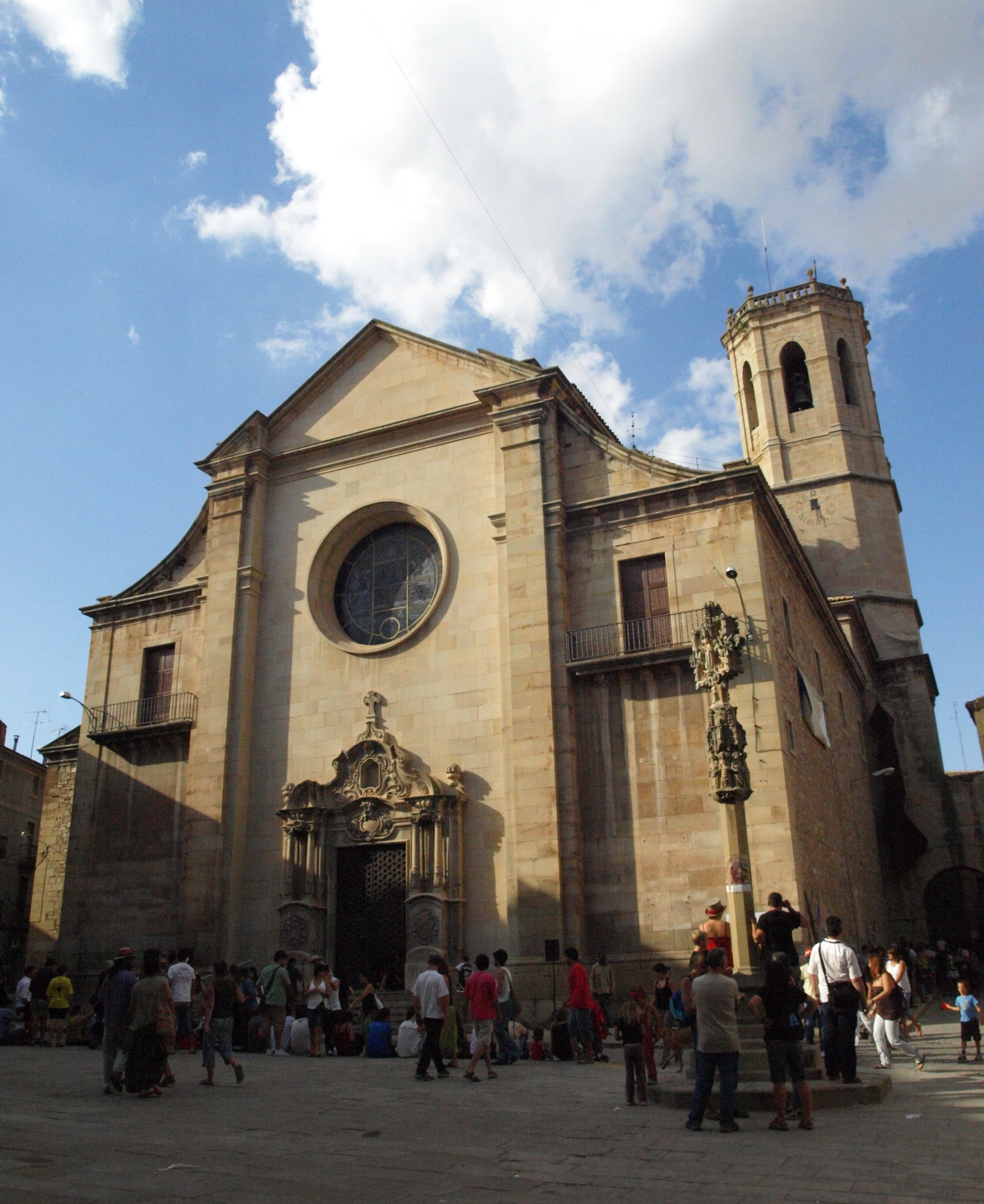 Iglesia de Santa María del Alba de Tárrega (Cataluña, España).